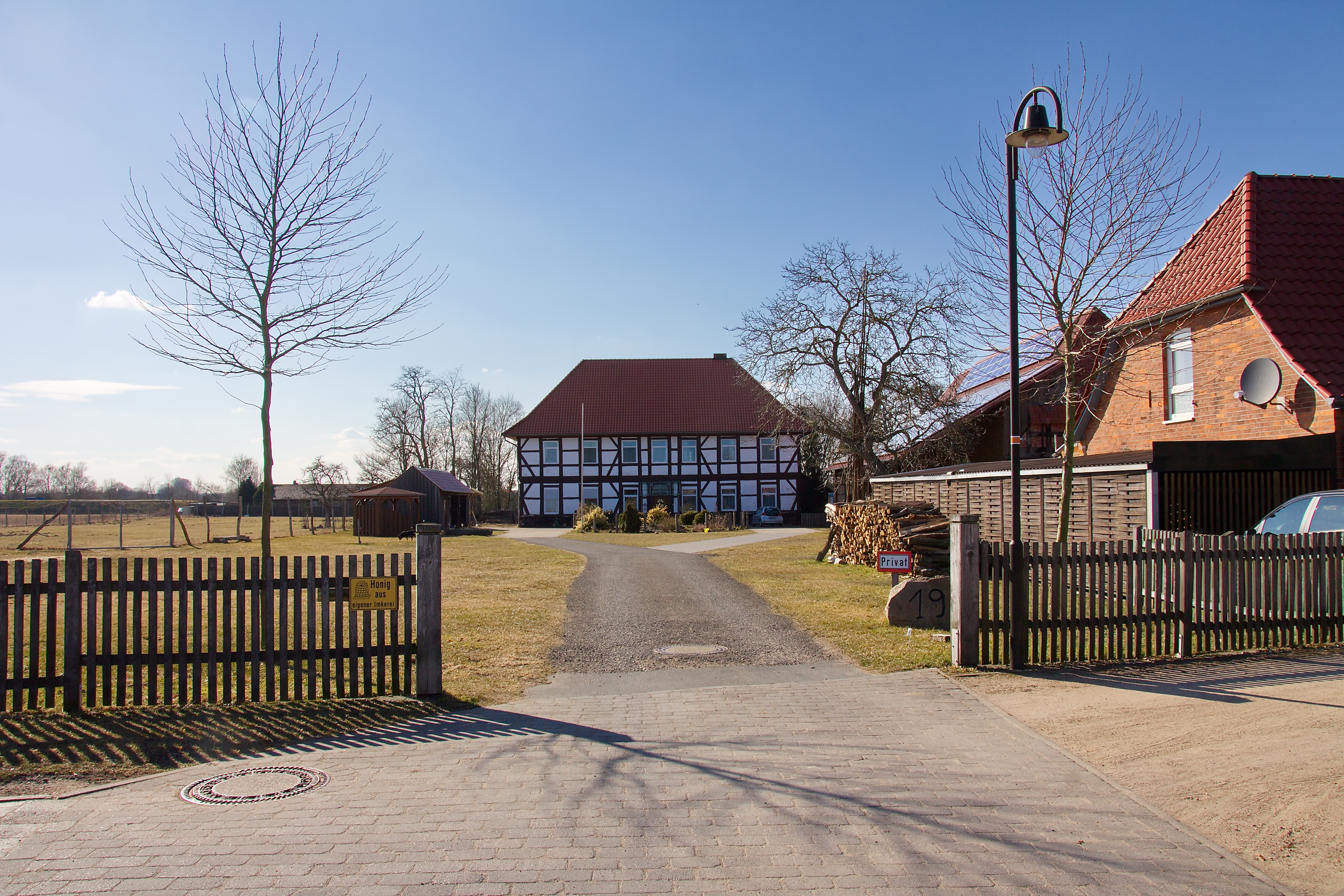 Haßbergen, Niedersachsen, Deutschland